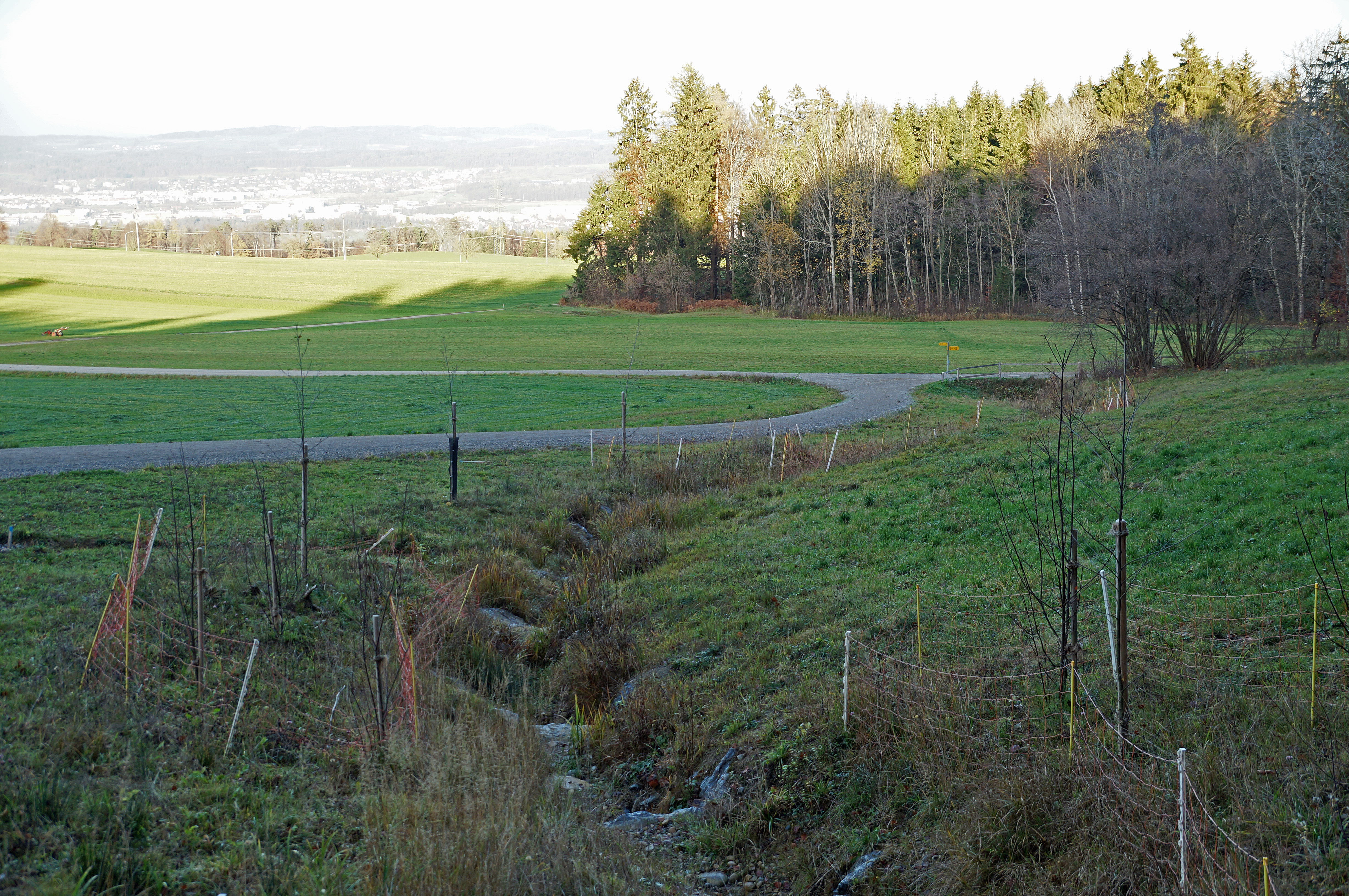 Wieder offengelegter Aschbach in der Grabenwis bei Ebmatingen